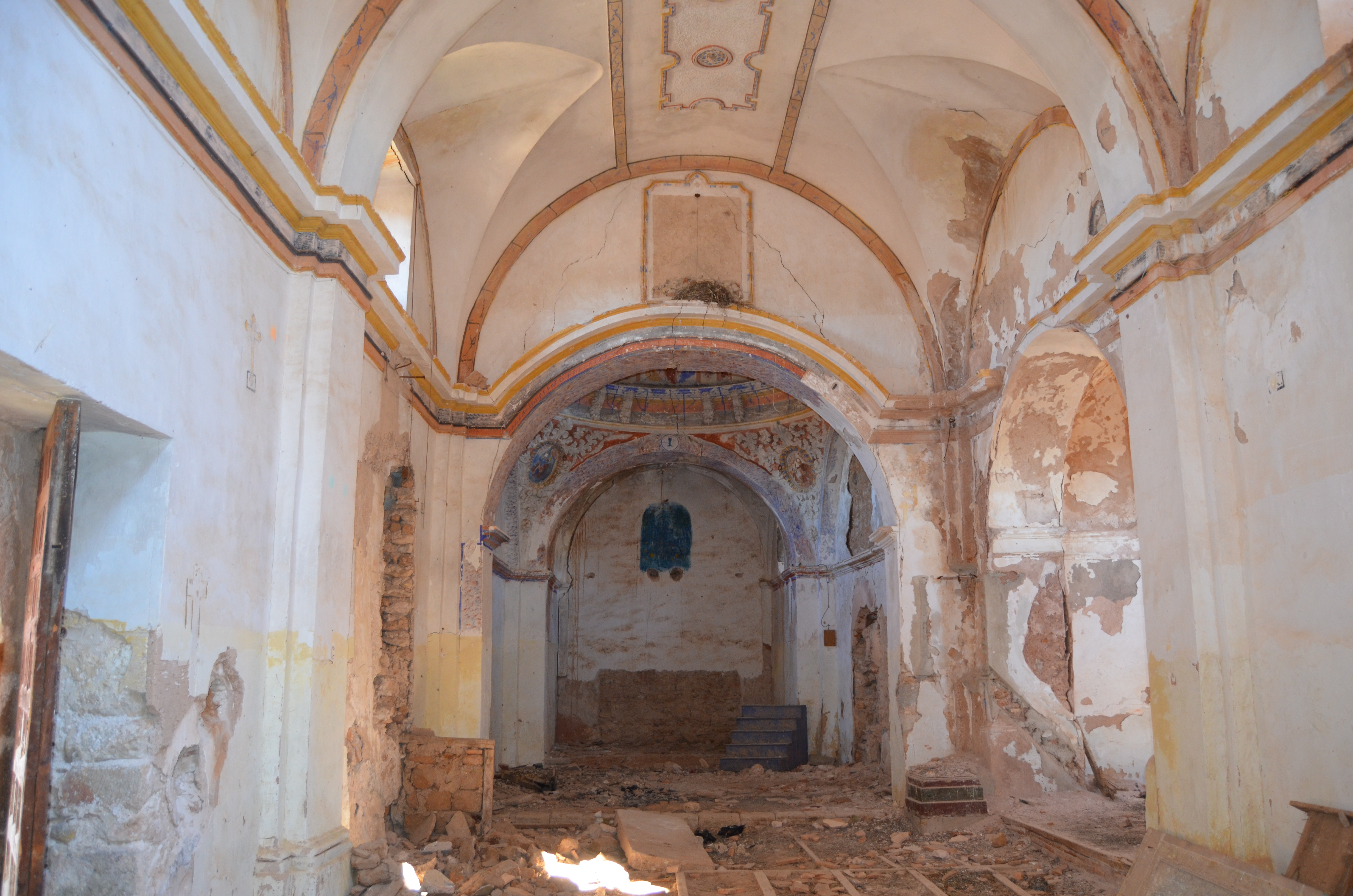 Cabreriza Interior de la Iglesia, donde se puede apreciar las pinturar y la decoración.